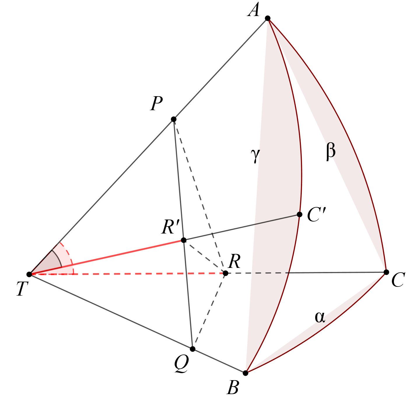 Drievlakshoek (driehoeksongelijkheid)